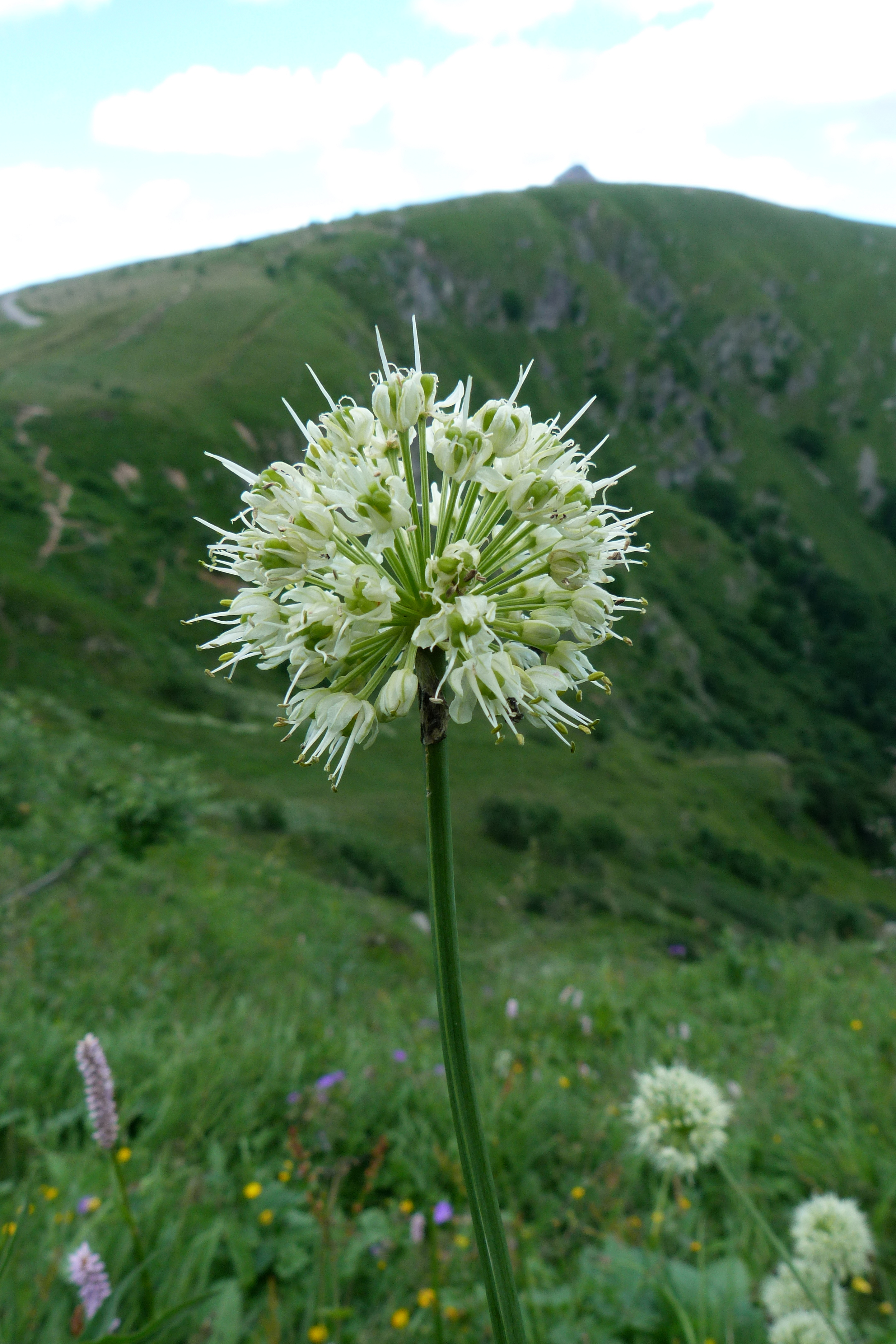 Allium victorialis au Wormspel, vers le Hohneck (massif des Vosges).